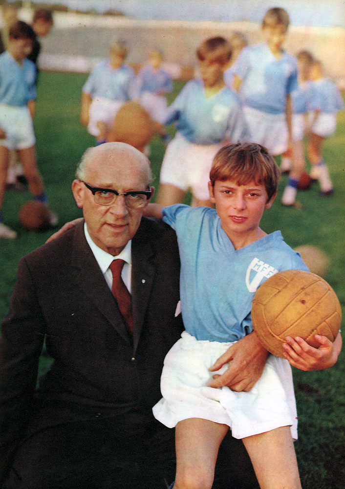 Eric "Hövdingen" Persson med dottersonen Mario